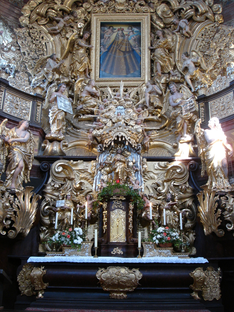 Hauptaltar der Wallfahrtskirche Maria Trost in Dobrá Voda u Horní Stropnice